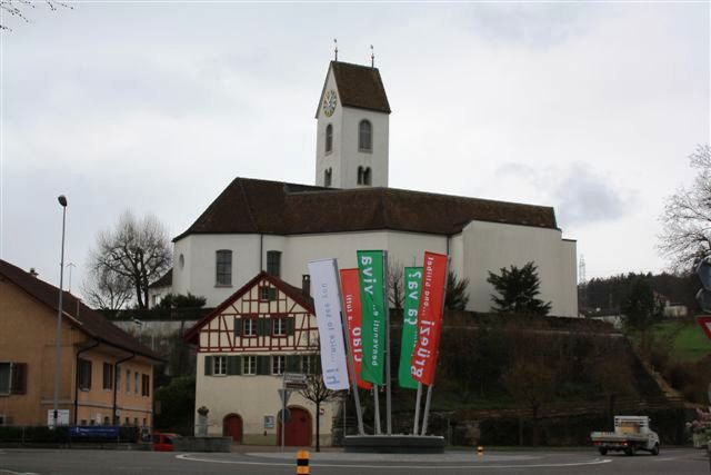 Röm.-kath. Kirche Lengnau AG, Schweiz